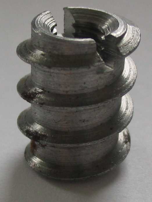 Eine Rampamuffe. Kamera: Canon PowerShot A70